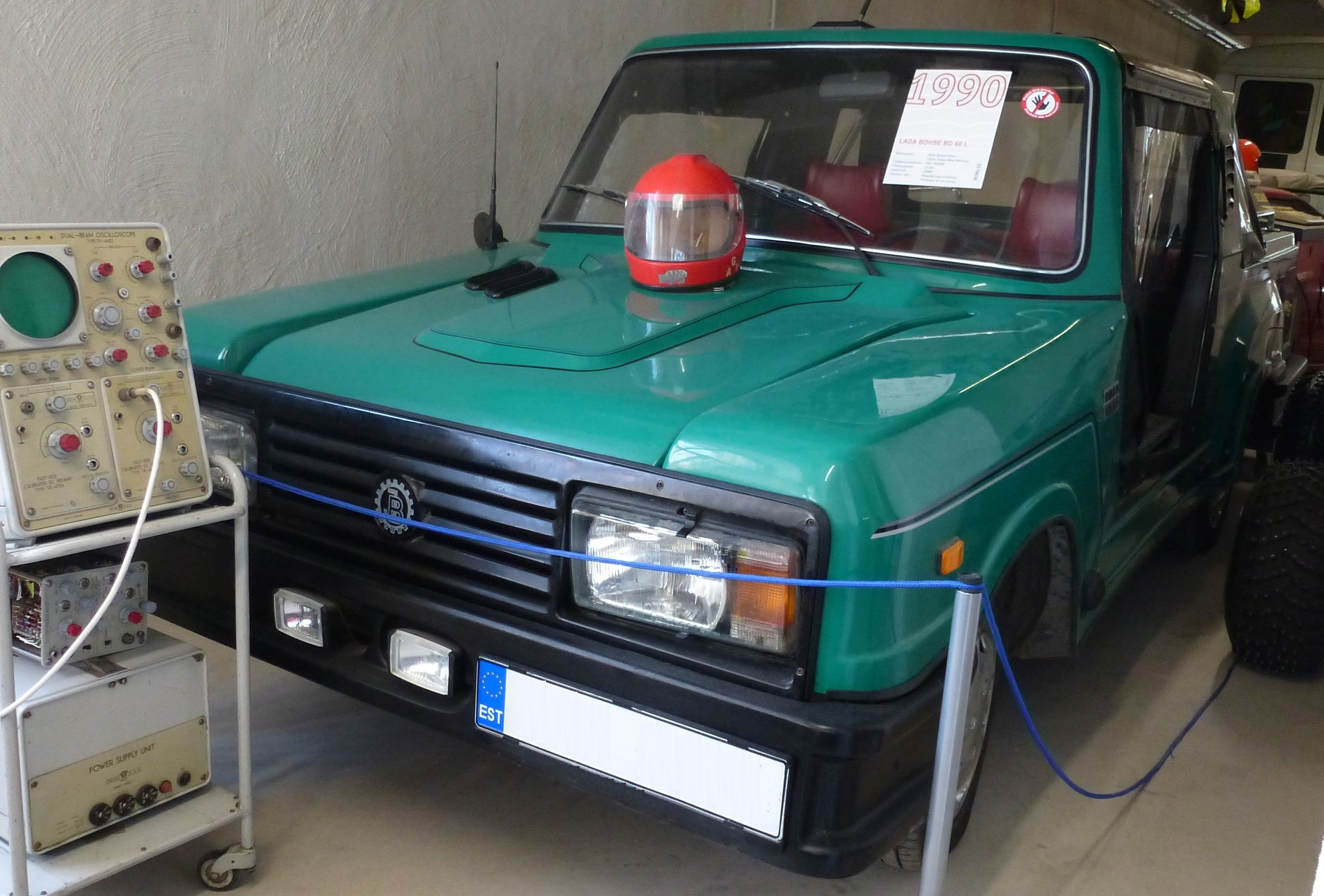 Bohse Eurostar 1990